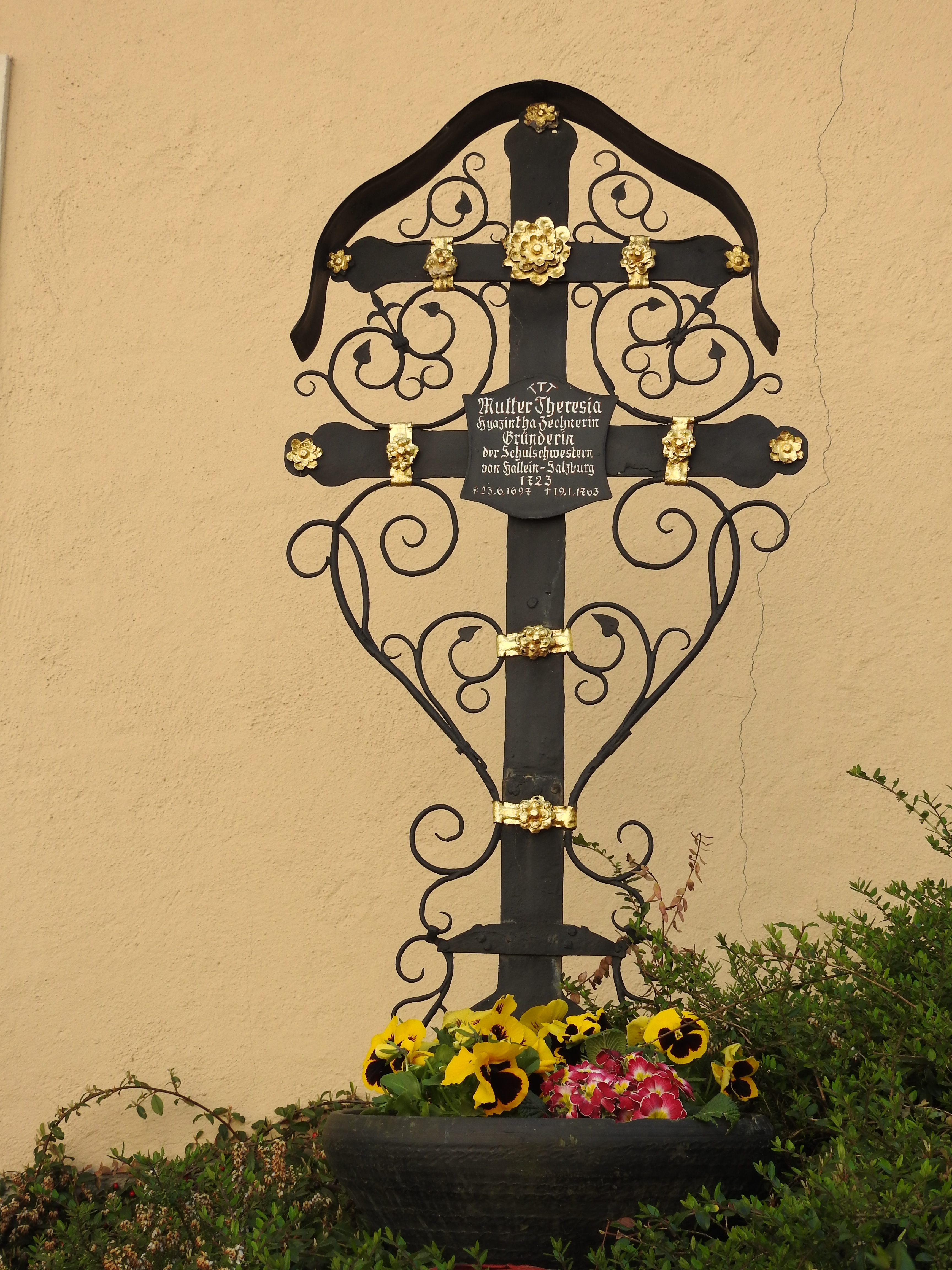 Gedächtniskreuz für die Gründerin der Halleiner Schulschwestern Maria Theresia Zechner in Hallein